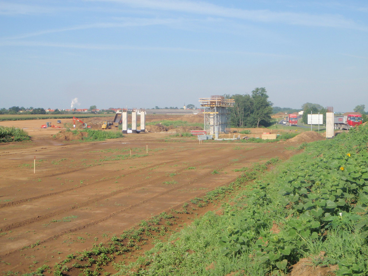 M86 Steinamangerer Schnellstrasse in Bau bei Steinamanger-Ost